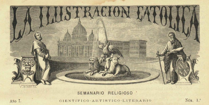 Cabecera del primer número de la revista española La Ilustración Católica, del 5 de agosto de 1877.